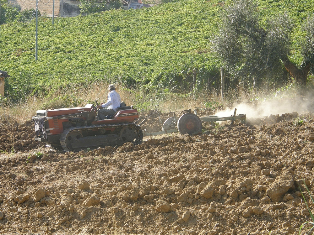 New Holland Trattore in Pescara